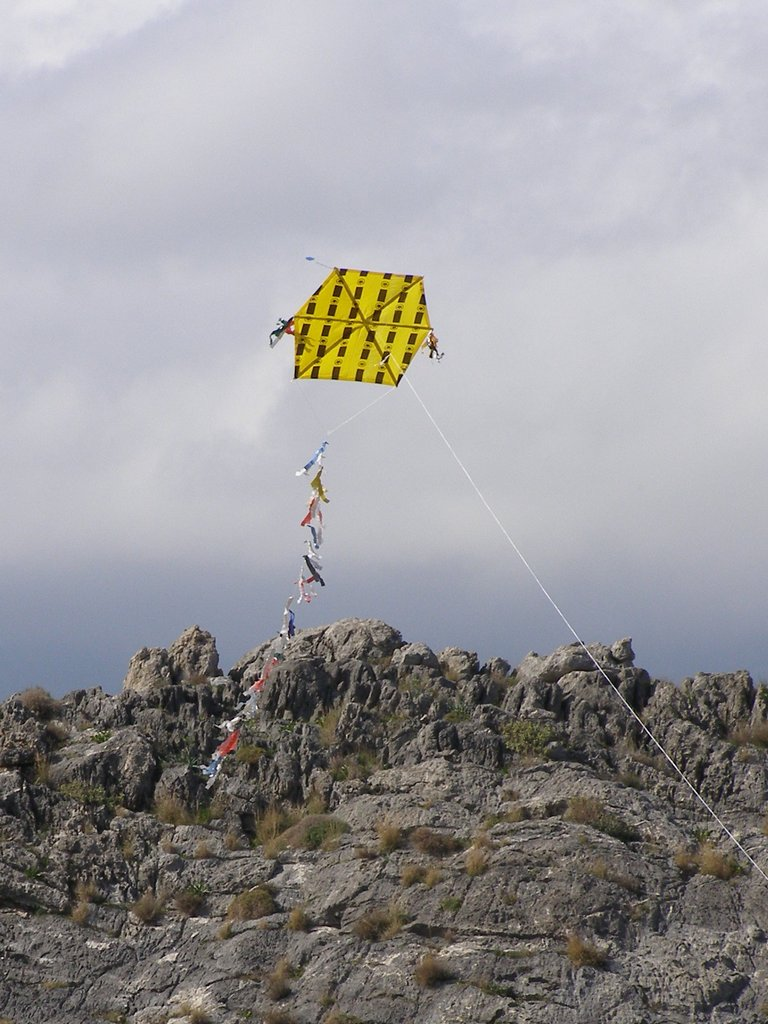 Papierdrache, orthodoxer "Rosenmontag"-Brauch (Kathara Deftera), in Ammoudi